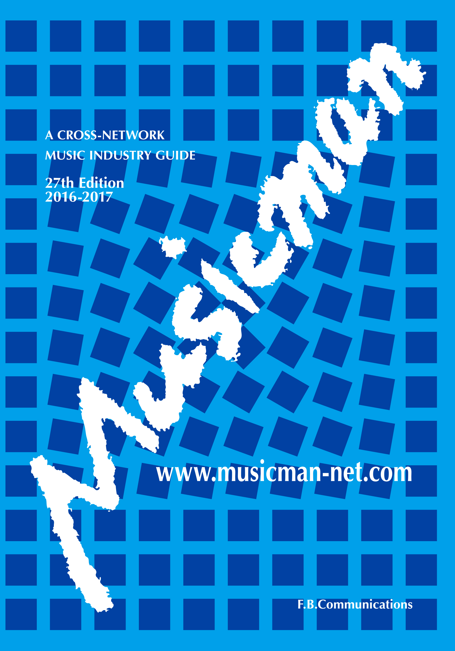 『Musicman 2016-2017』表紙